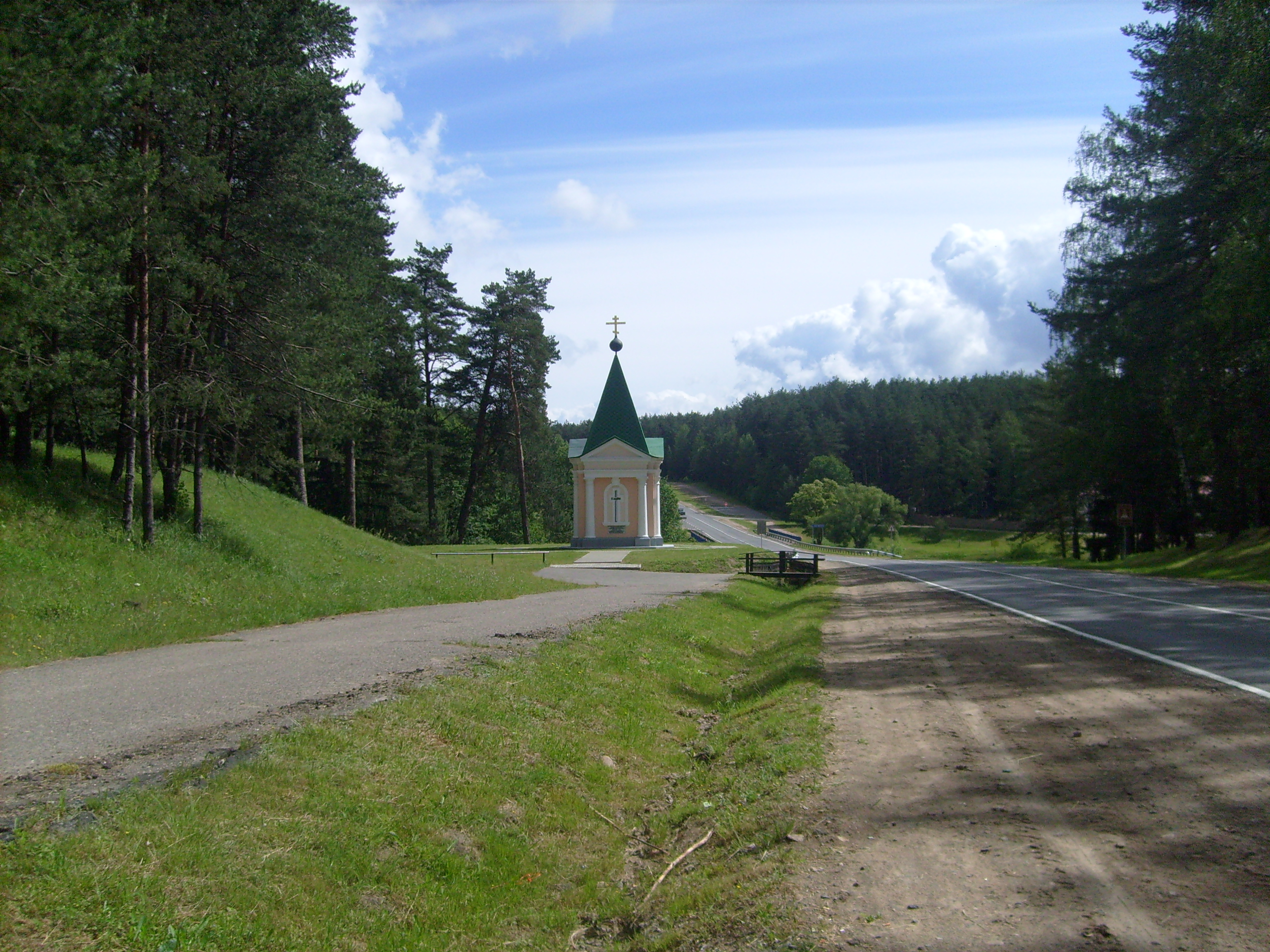 Мемориальная часовня в память об Отечественной войне 1812 года (построена в 1912 году)